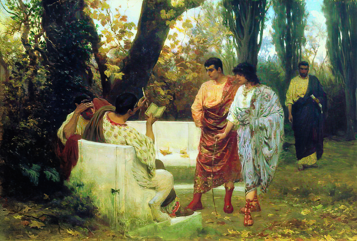 Roman poet Catullus reading to his friends.label QS:Len,"Roman poet Catullus reading to his friends." label QS:Lfr,"Le poète romain Catulle lisant ses poèmes à ses amis." label QS:Lru,"С. В. Бакалович. "Римский поэт Катулл, читающий своим друзьям"."